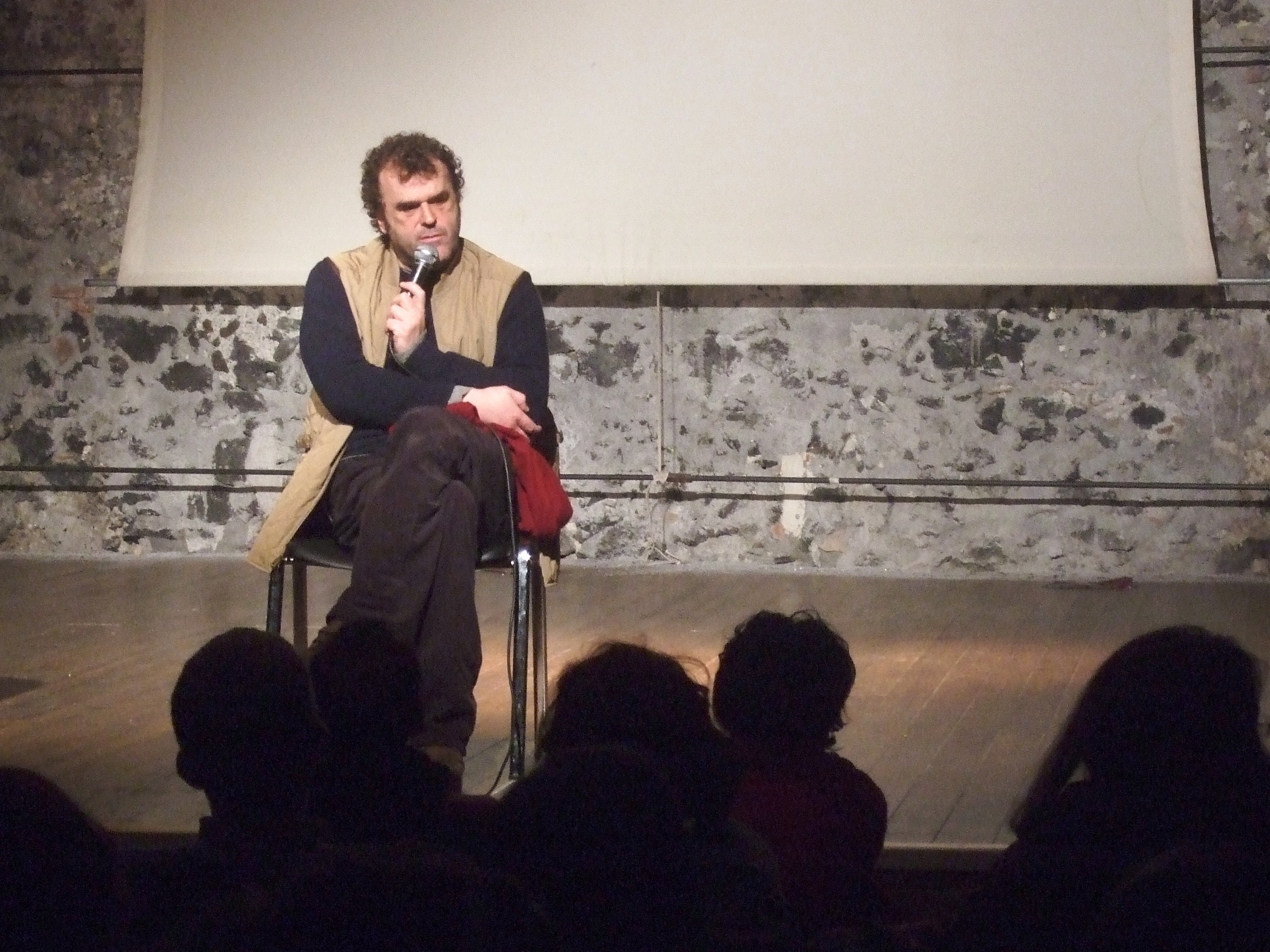 Pippo Delbono in un incontro con il pubblico nella sede della Lomax di Catania (07 marzo 2010)